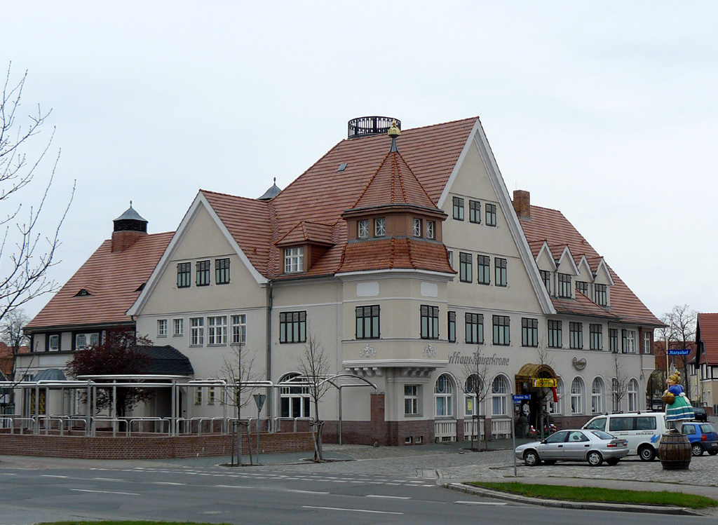 Gartenstadt Marga in Brieske/ Senftenberg/ Brandenburg/ Deutschland